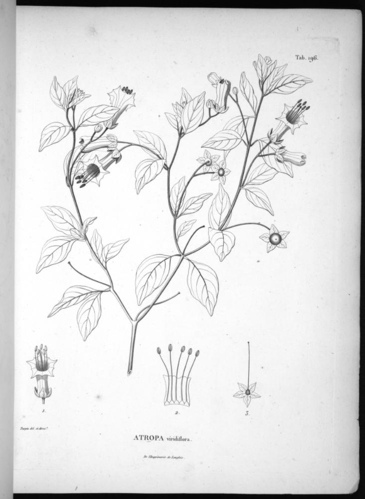 Illustration of Jaltomata viridiflora (Orig. Atropa viridiflora)